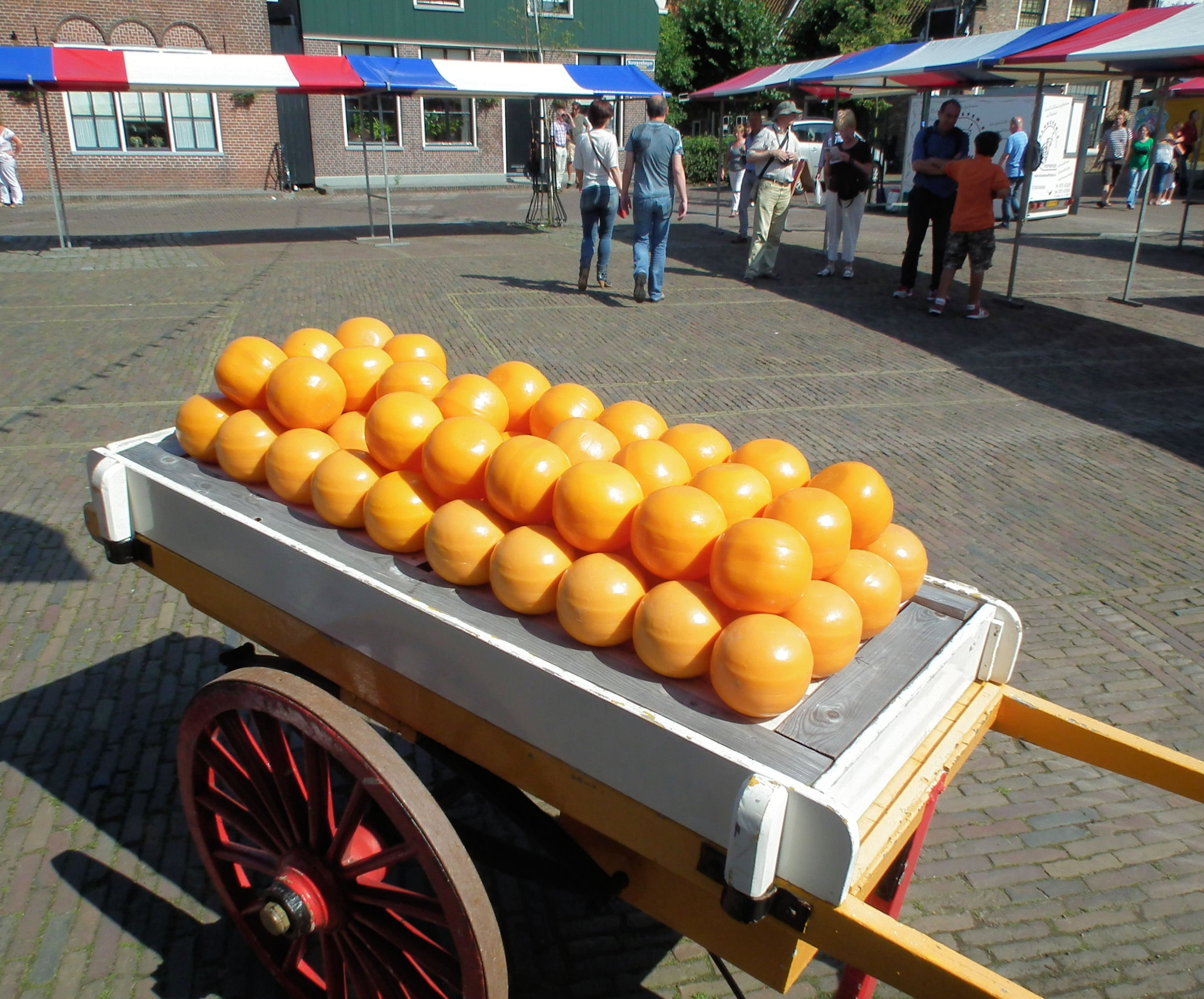 Nederland - Edam - Jan Nieuwenhuizenplein / Kaasmarkt